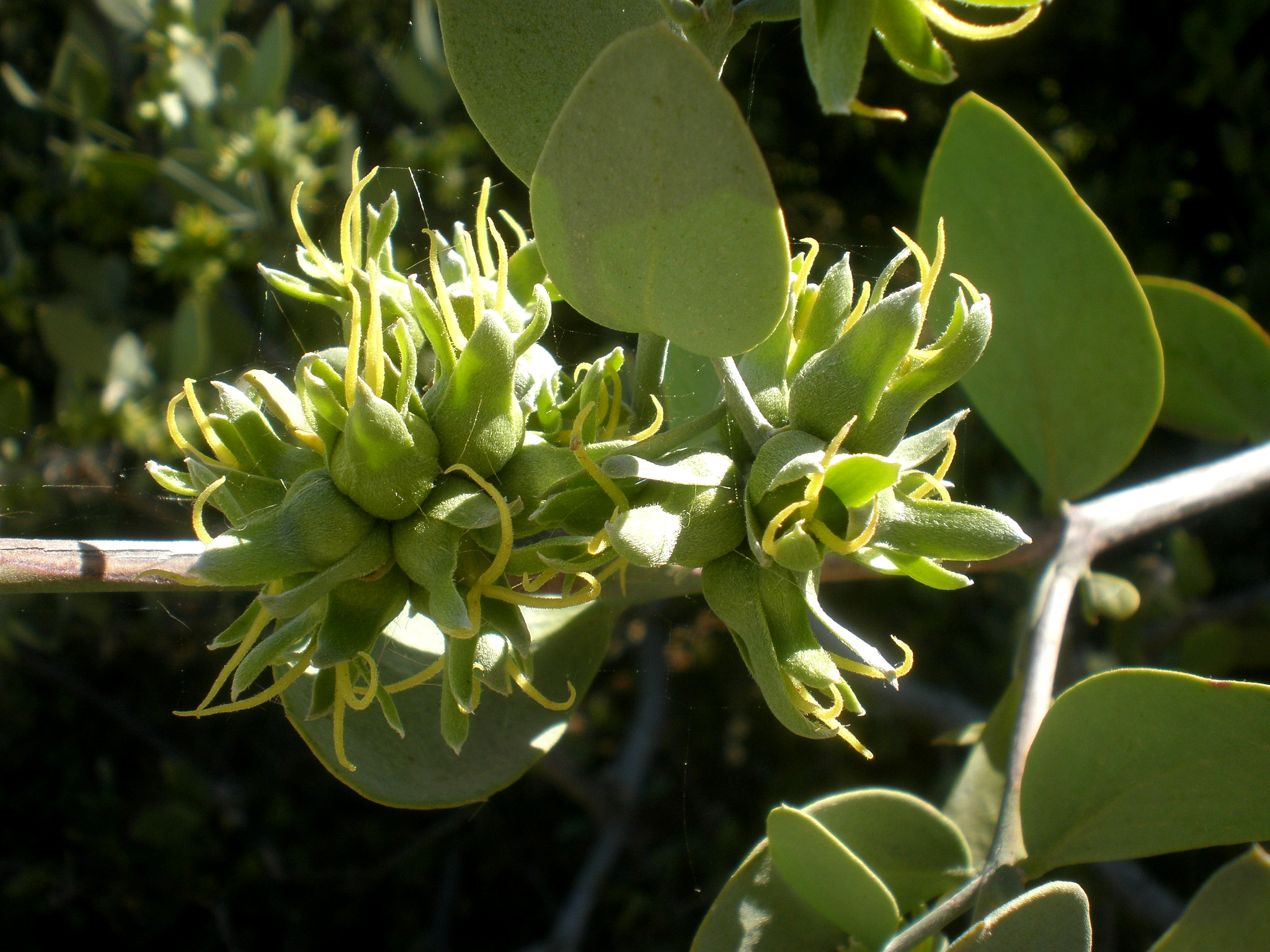 Jardín Botánico de Barcelona.